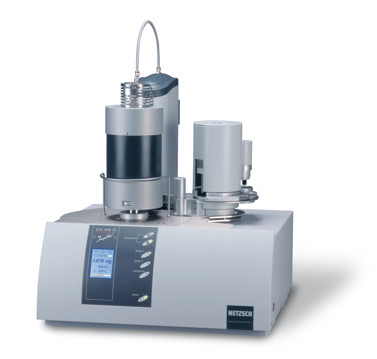 DSC en TGA (thermogravimetrische analyse) worden vaak gecombineerd in één meetinstrument, waardoor de thermische effecten automatisch worden gecorrigeerd voor de werkelijk aanwezige sample massa bij iedere temperatuur (getoond is de Netzsch STA 449 F1 van Technex BV)